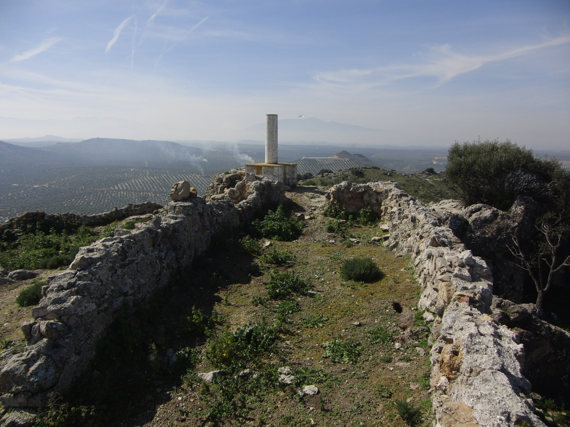 Ruinas del Castillo de Peñaflor.